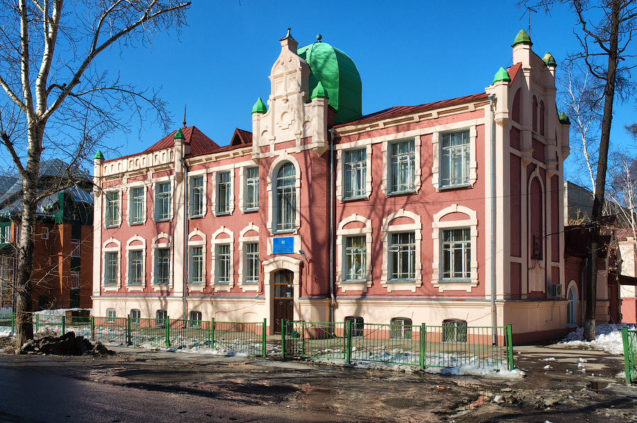 Здание школы (Томская область, Томск, пирогова улица, 10)